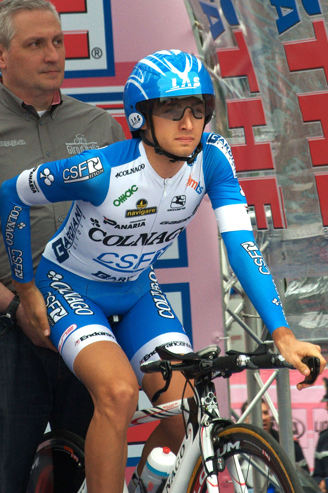 Gianluca Brambilla before the start of last stage Giro d'Italia 2012